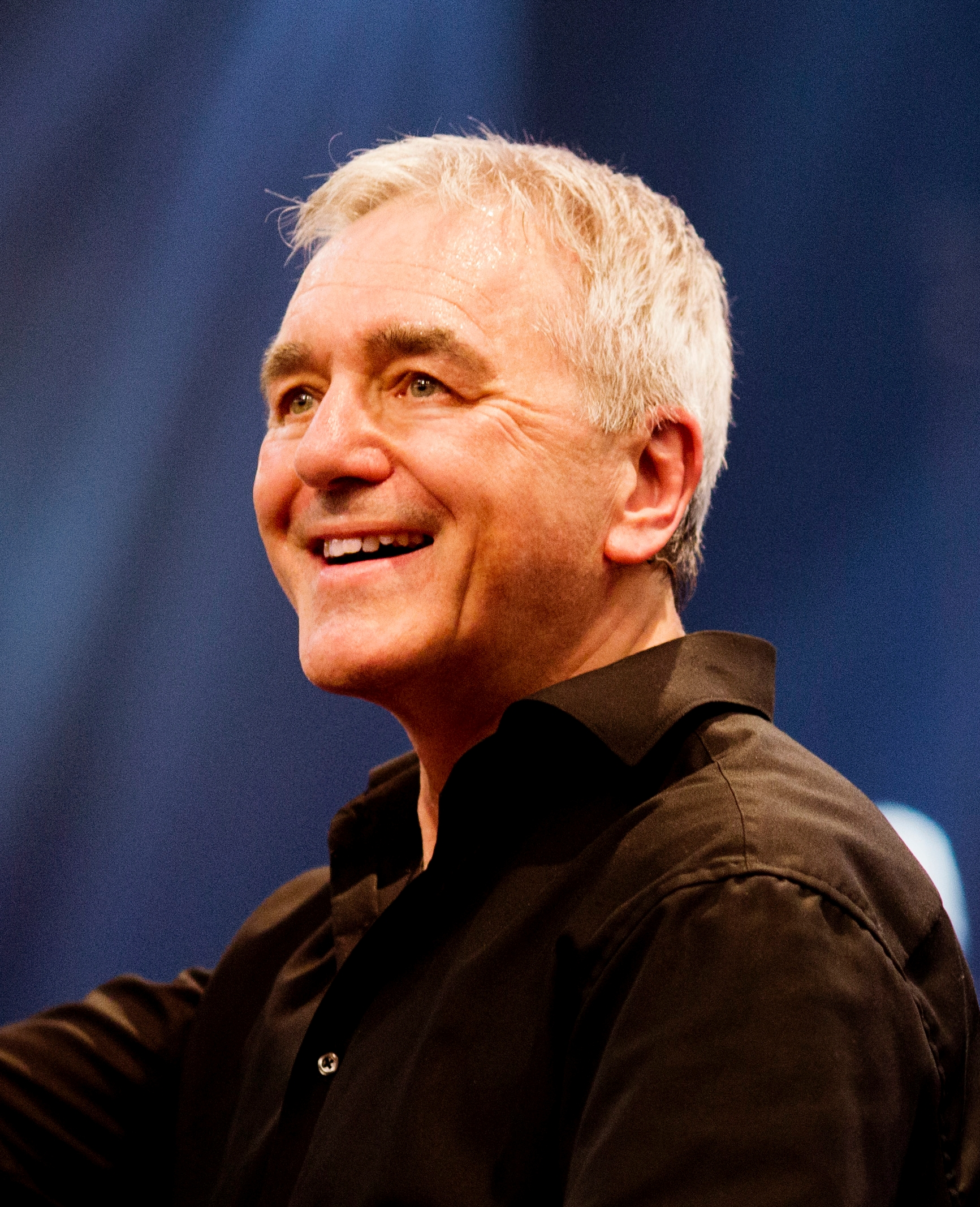 Arman Howard dirigiert den Chor des Bayerischen Rundfunks